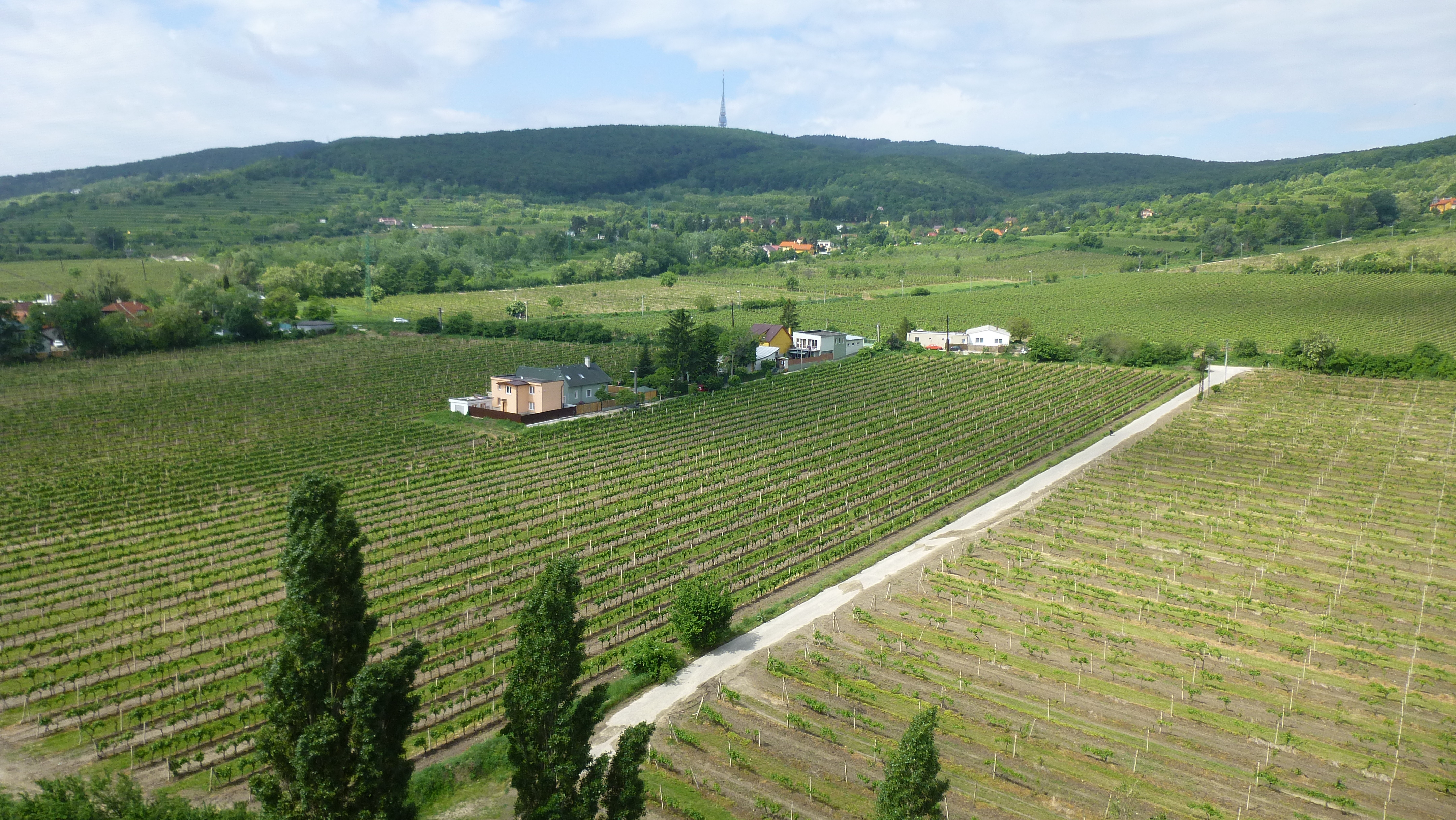 BRATISLAVSKÉ VINOHRADY